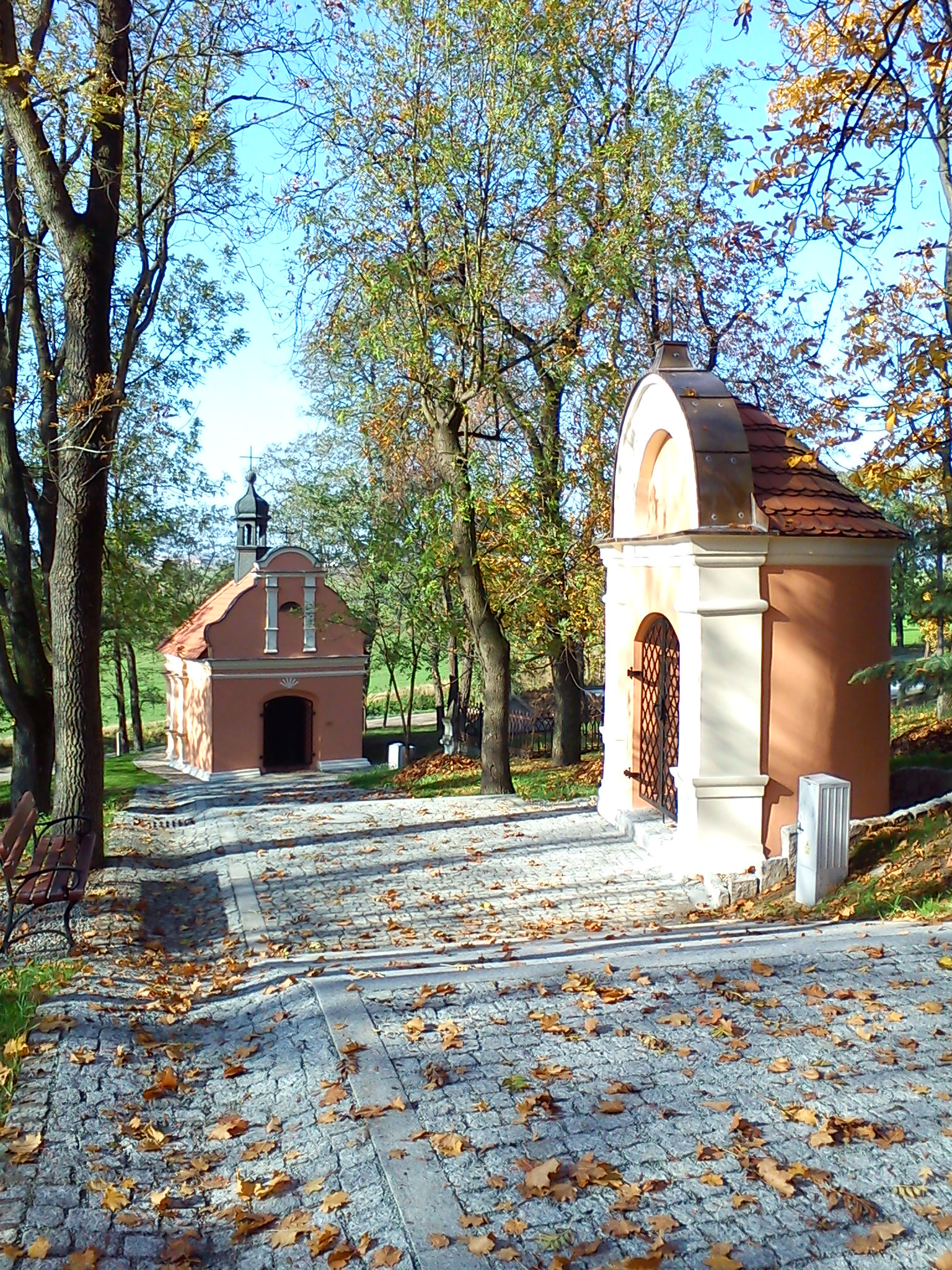 kalwaria6